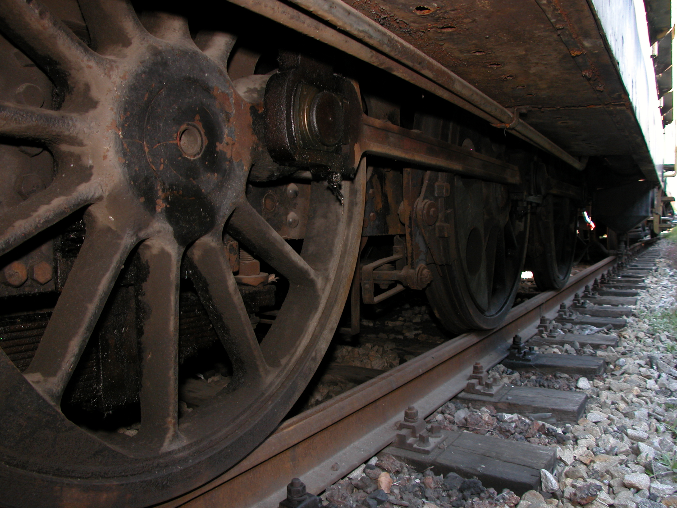 Locomotiva elettrica da manovra FS E.321.003 – Particolare della biella dell'asse posteriore destro.